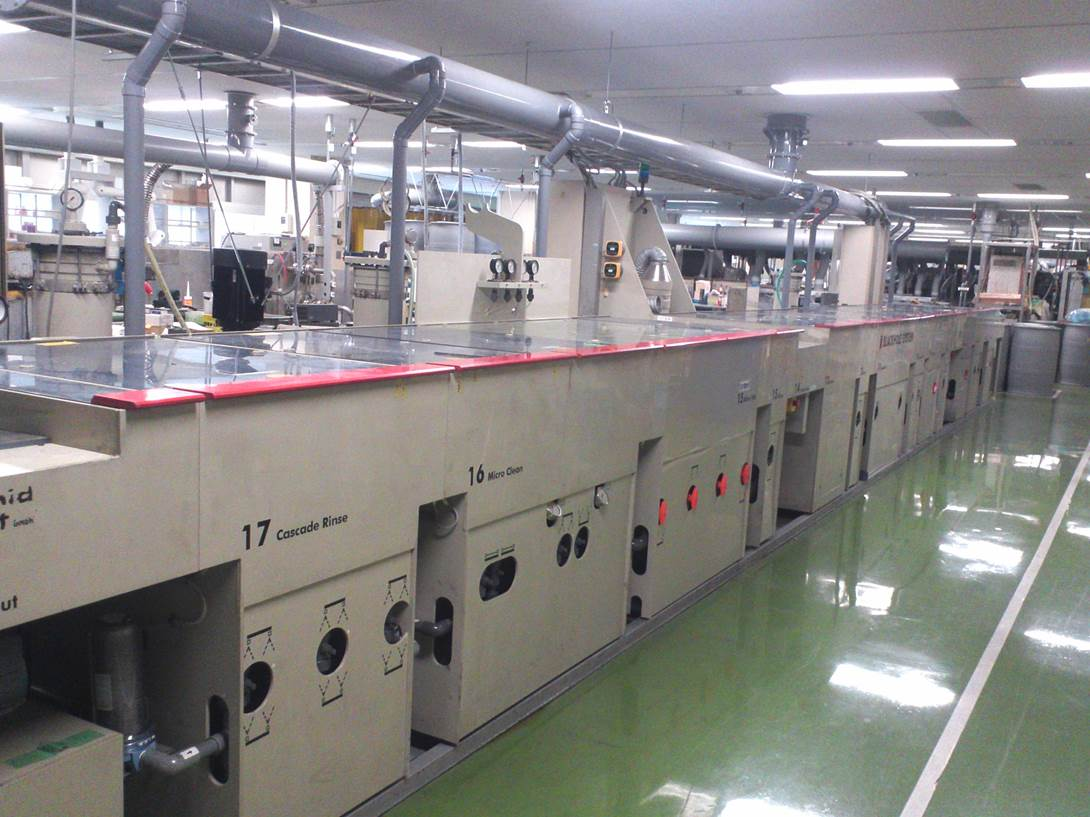 日本マクダーミッド内ラボ施設